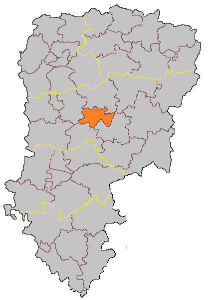 Кантон Лан-Север на карте департамента Эна